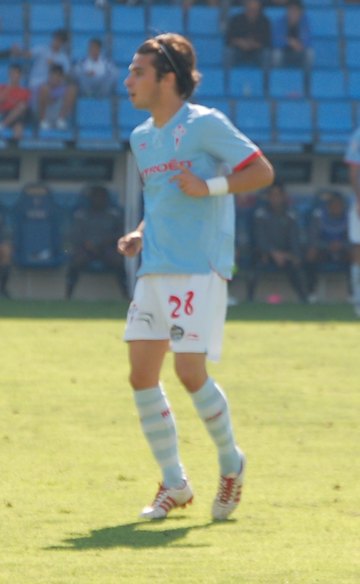 José Ignacio Peleteiro Ramallo nun encontro co Real Club Celta no Estadio de Balaídos Imaxes de futbolistas de Galicia